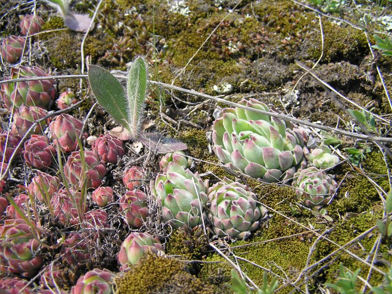 Рослинний світ Гранітно-Степового Побужжя